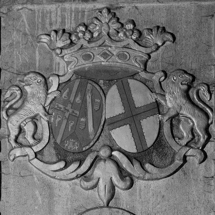 Mont-sur-Marchienne (Charleroi-Belgique - Église de la Conversion de saint Paul - Dalle funéraire de Barbe-Thérèse de Haynin, épouse de Jean de la Torre, et de leur fille Marie-Anne. Détail.